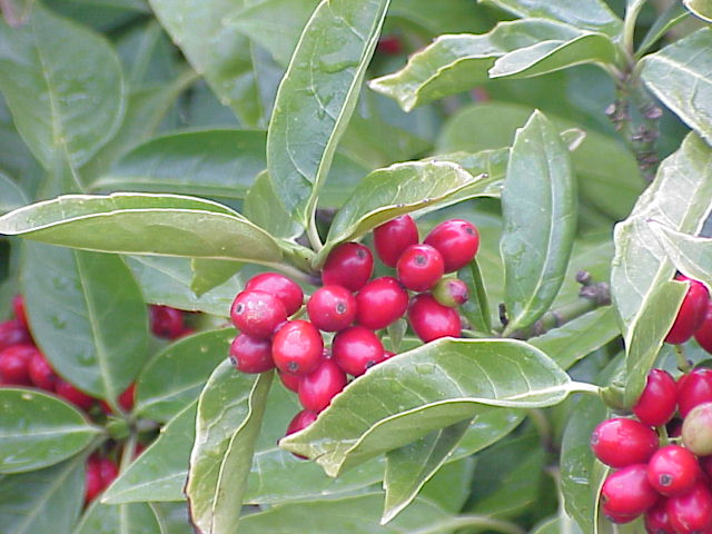 Species: Aucuba japonica Family: Cornaceae Image No. 2